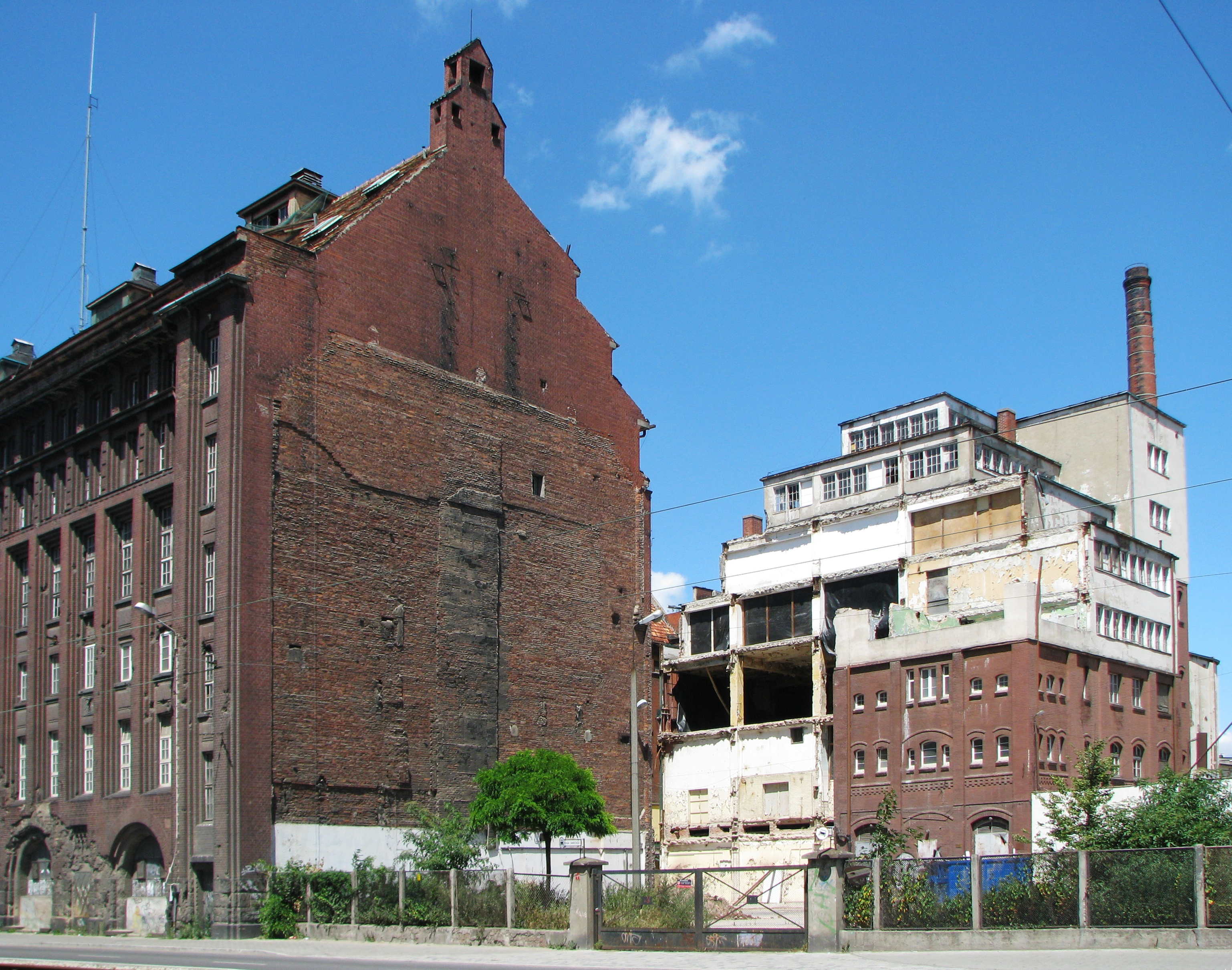 Wrocław, Śródmieście, ul. Sienkiewicza 18-22 - zespół budowlany Spółdzielczych Zakładów Piekarsko-Ciastkarskich „MAMUT”. Widoczny: budynek dawnego magazynu mąki (lewy), główny budynek produkcyjny z kominem (prawy).